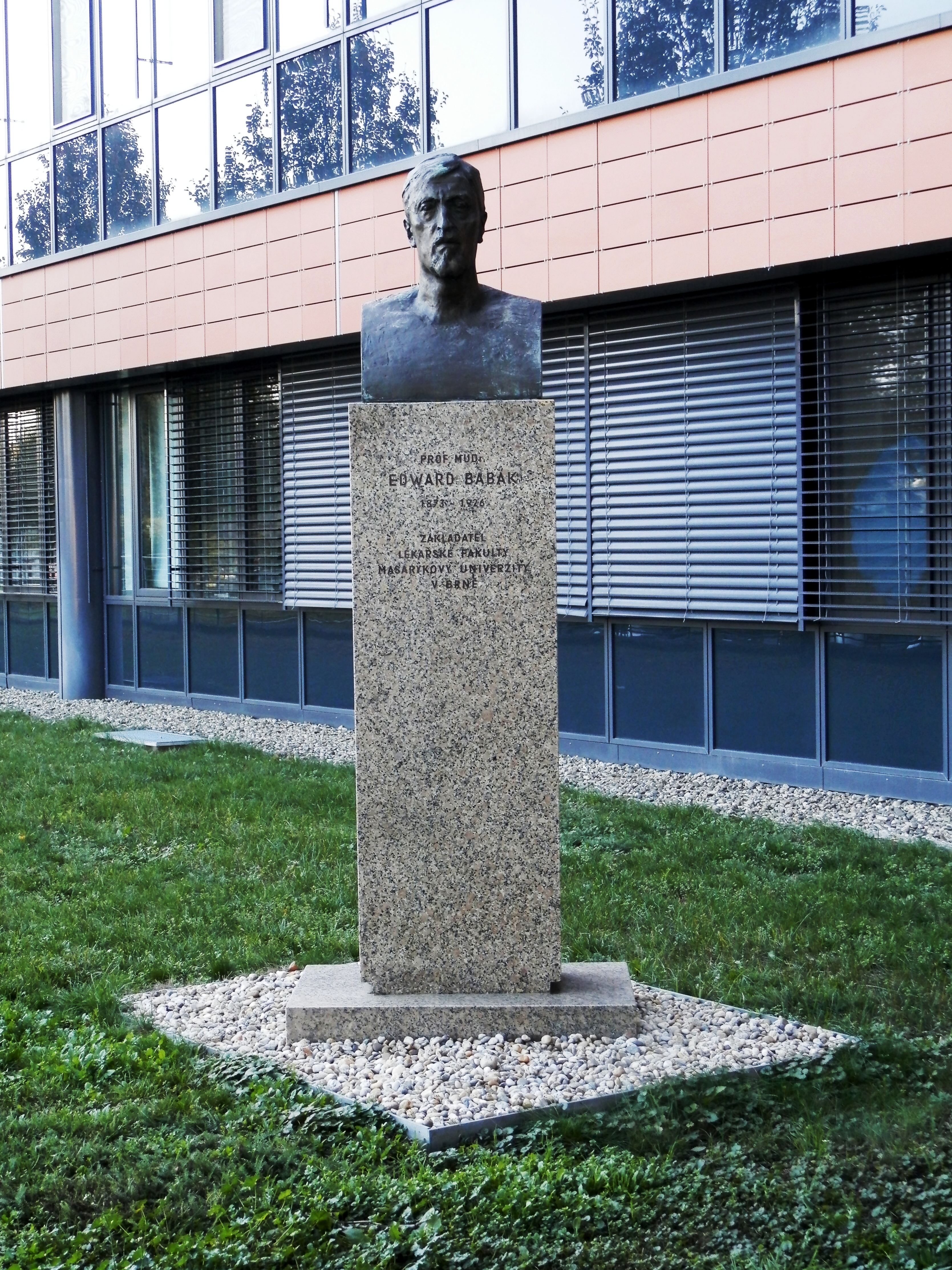 Pomník Eduarda Babáka (Brno), Brno - město, pův. ul. Joštova, dnes v Univerzitním kampusu v Bohunicích, Brno